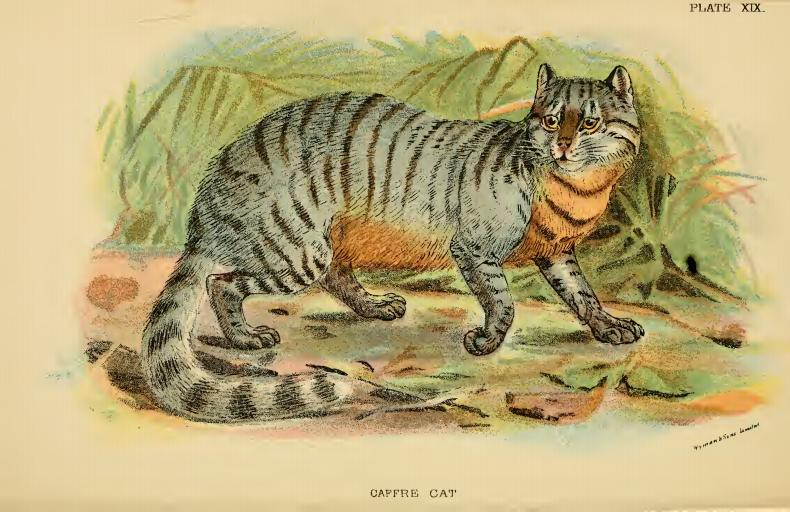 Caffre Cat. Felis caffra